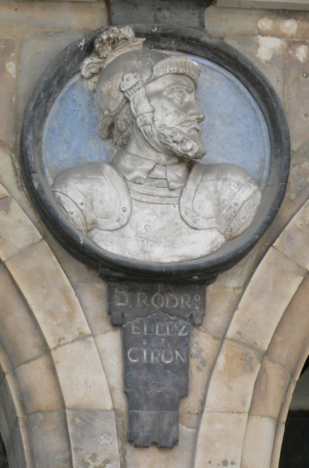 Medallón con la efigie de Rodrigo Téllez Girón, en el Pabellón de San Martín, Plaza Mayor de Salamanca (España).